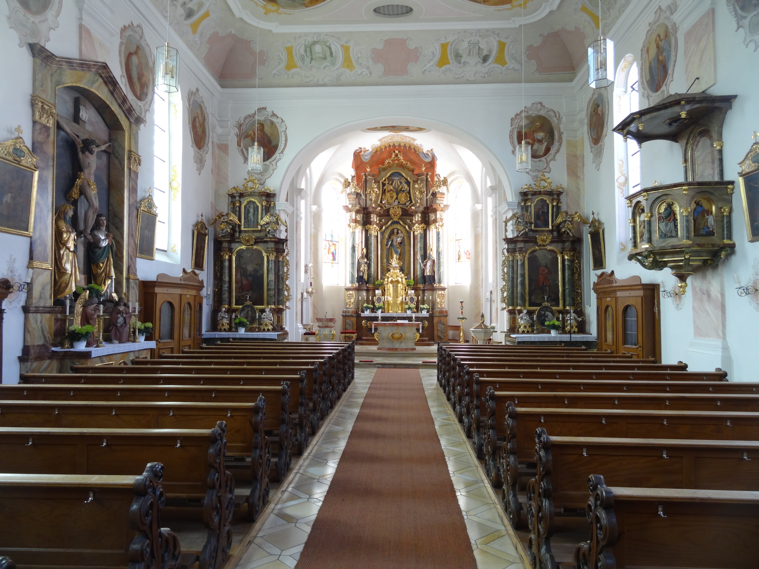 Innenansicht der Pfarrkirche Maria Immaculata in Elsendorf (Lkr. Kelheim)